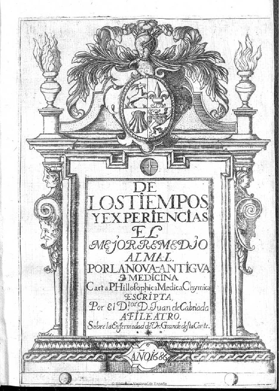 De los tiempos y experiencias el mejor remedio al mal por la nova antigua medicina : carta philosophica medica chymica ... escripta por ... D. Juan de Cabriada ... Autor: Cabriada, Juan de Fecha: 1686 Datos de edición: En Madrid en la oficina de Lucas Antonio de Bedmar y Baldivia